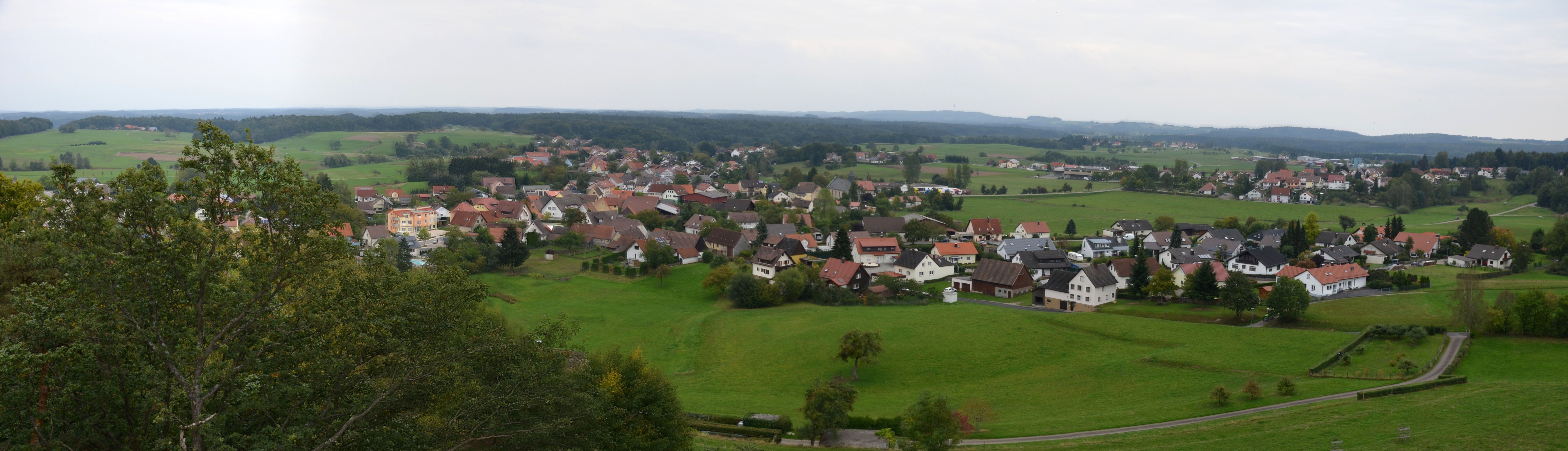 Panoramaansicht von Neuhütten (ca. 160°) vom Steinknickleturm.